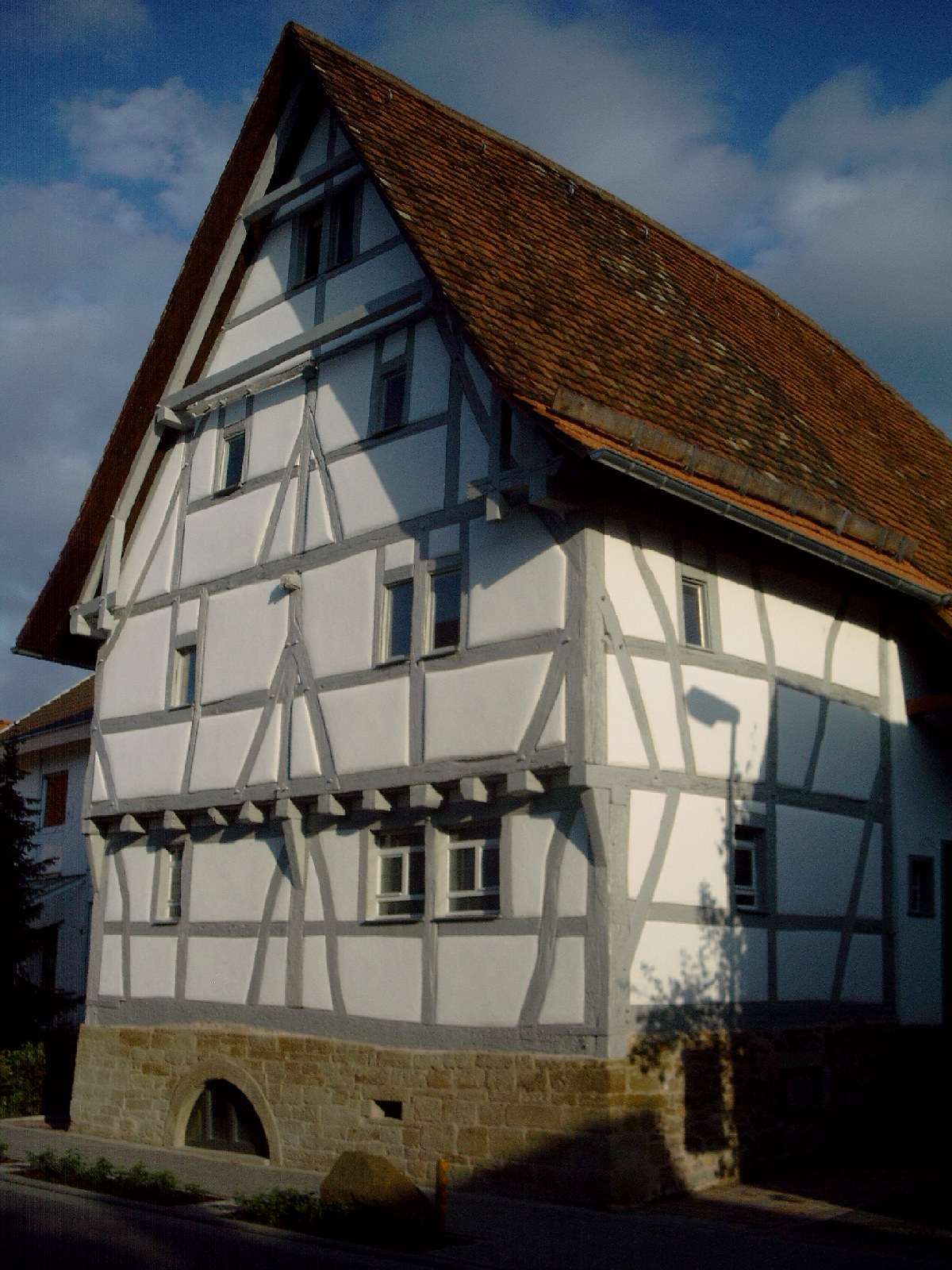 First-Ständer-Haus, Das restaurierte First-Ständerhaus, Zeutern in der Hauptstraße.